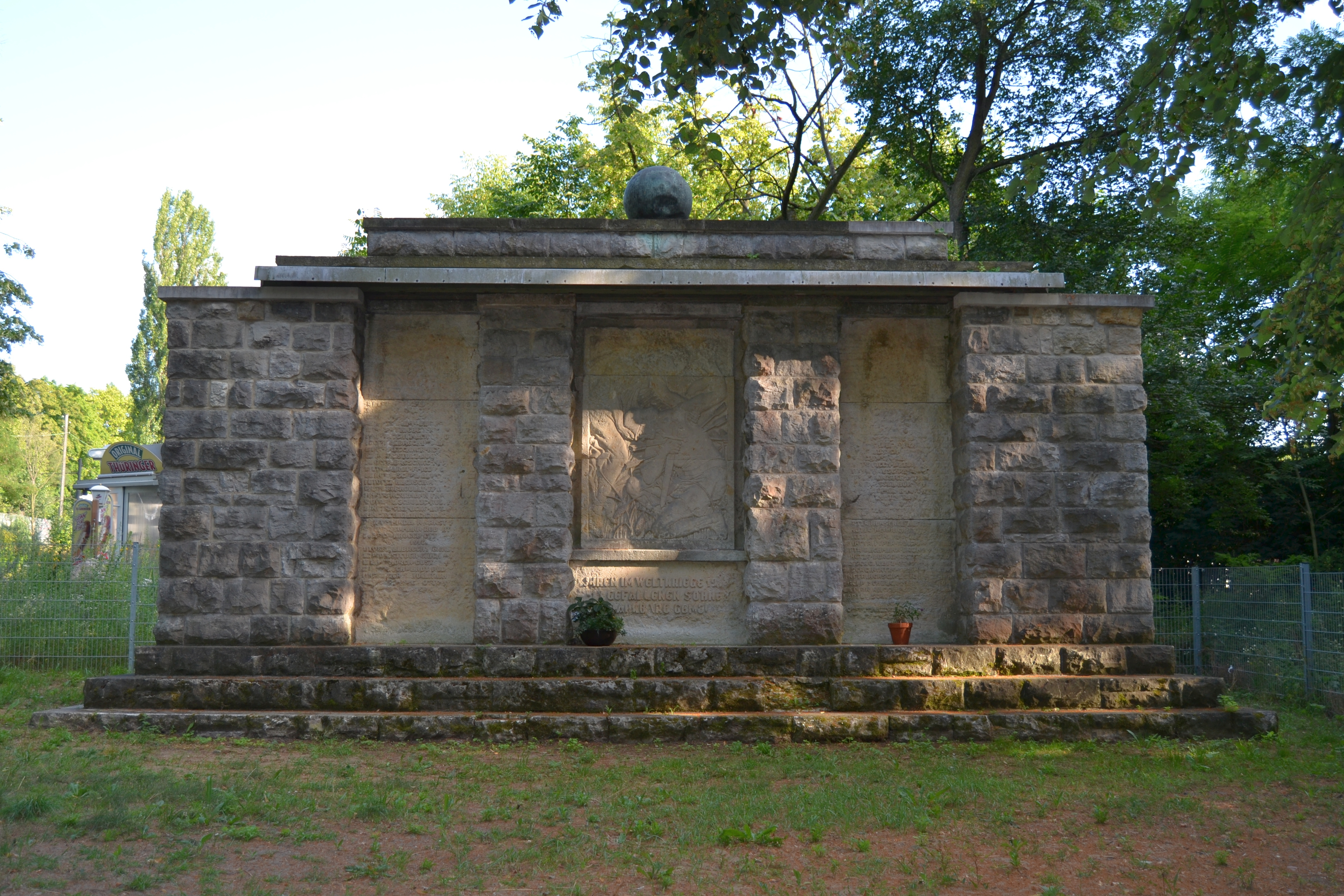 Denkmal für die Gefallenen Woltersdorfer des Ersten Weltkrieges (Fidusdenkmal).